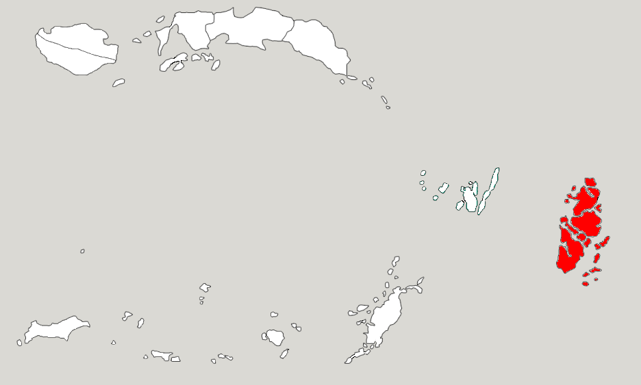 Округ Острови Ару